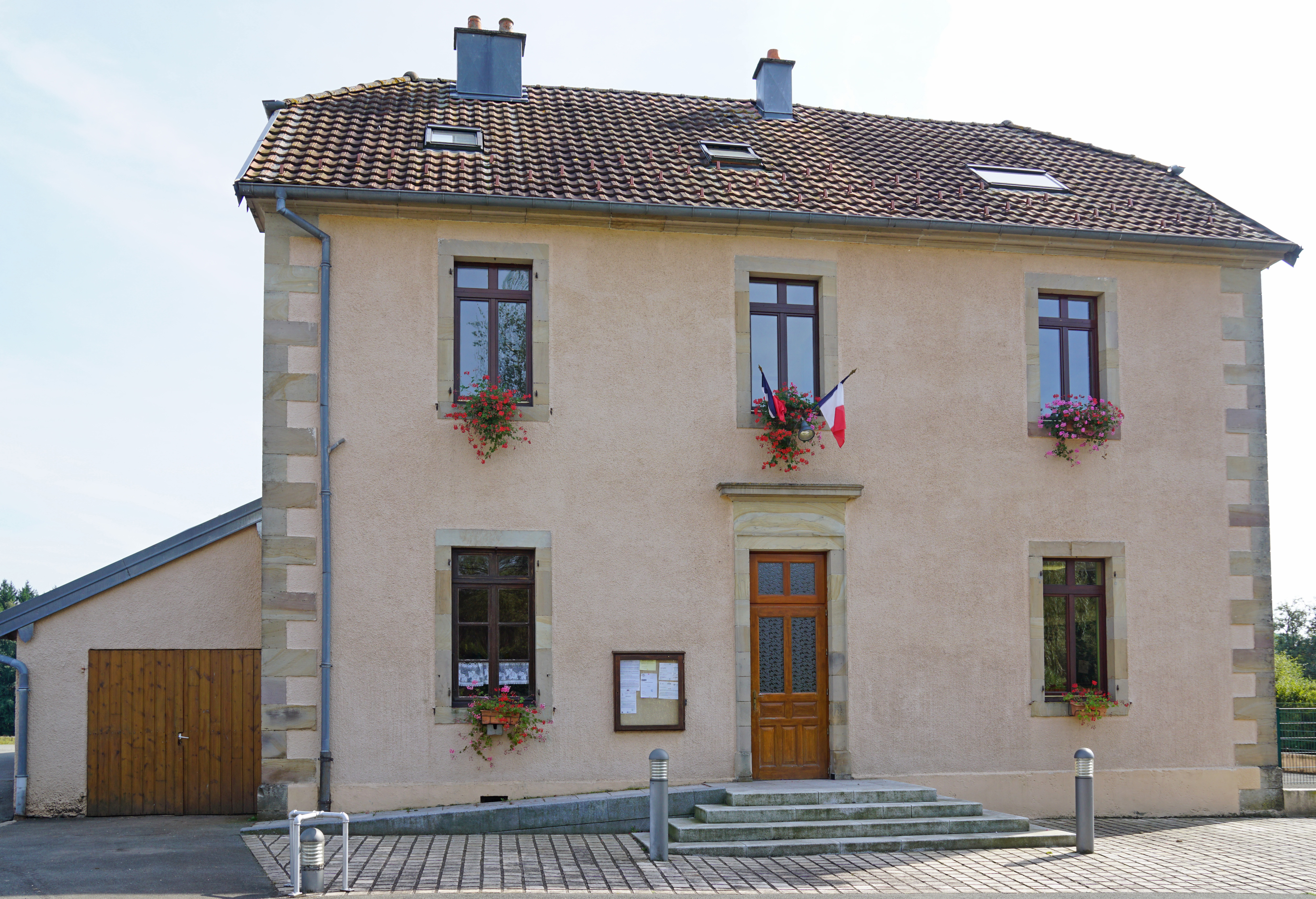 La mairie d'Errevet.